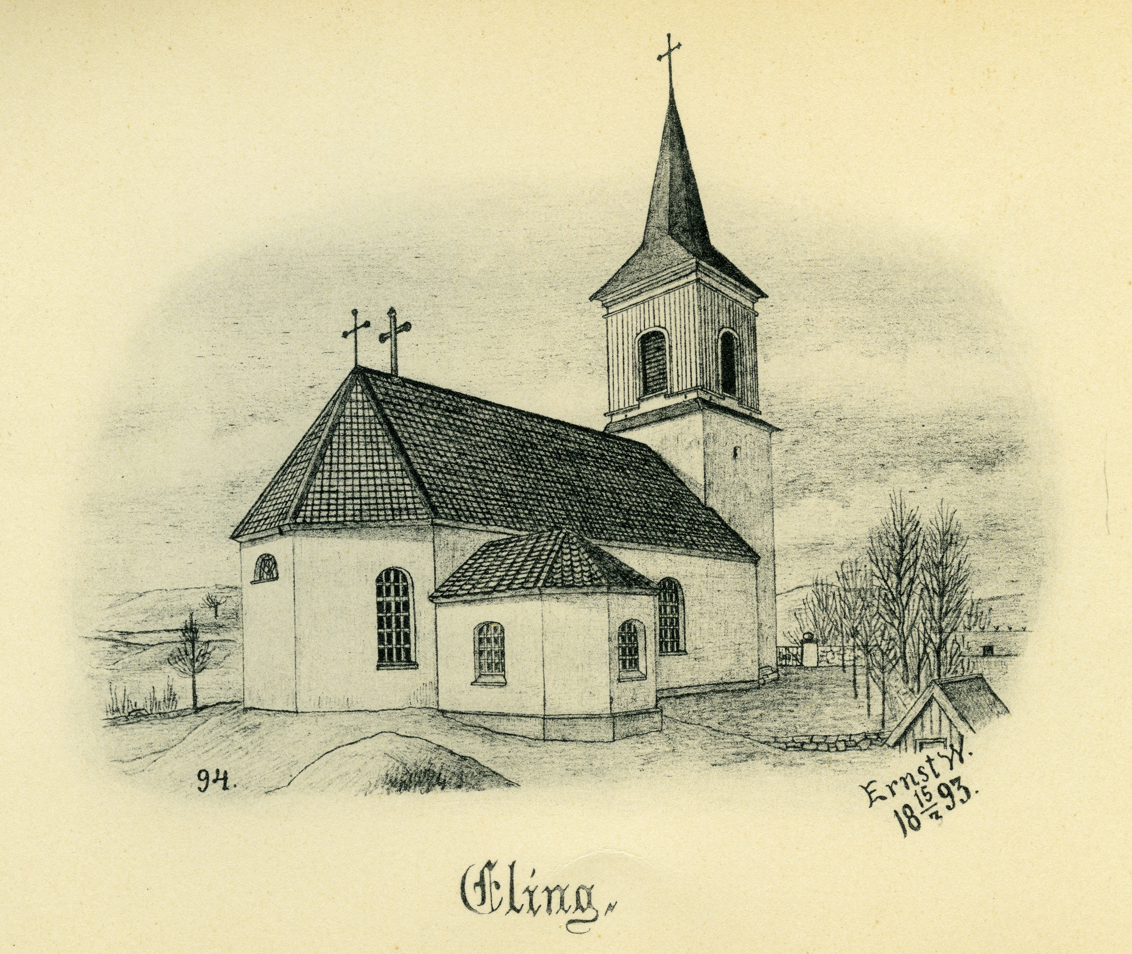 Elings kyrka år 1893 i Barne härad, Skara stift, Västergötland, Sverige. Teckning av Ernst Wennerblad ur Skara stifts kyrkor (1902).